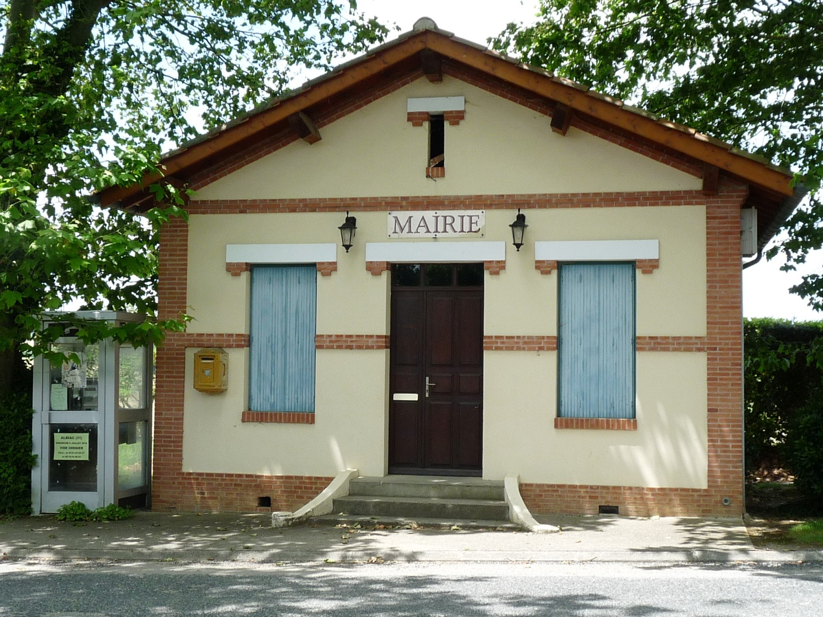 Mairie d'Albiac, Haute-Garonne, France